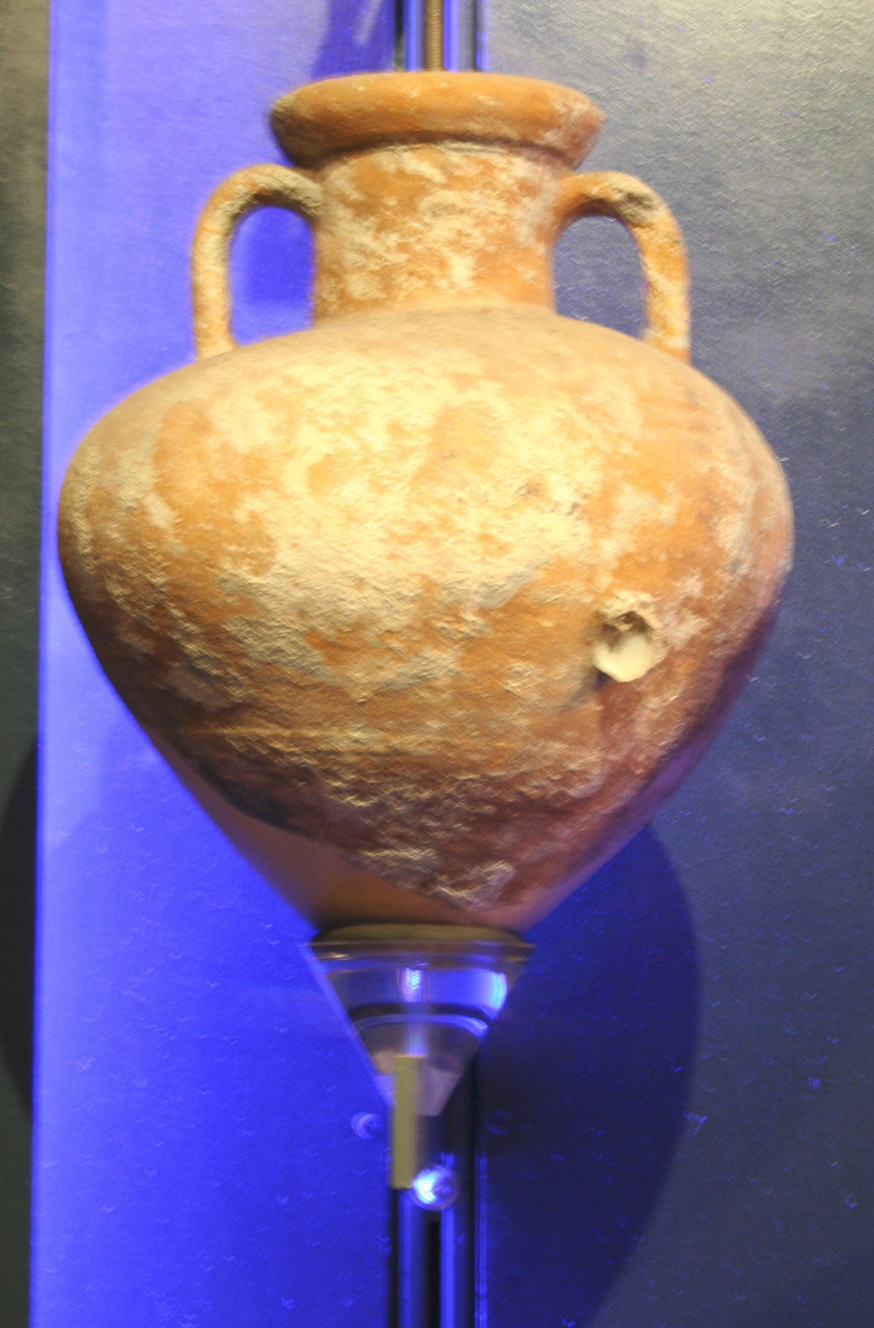 Musée des docks romains à Marseille, amphore massaliète à panse en toupie du VIe siècle avant J.C.